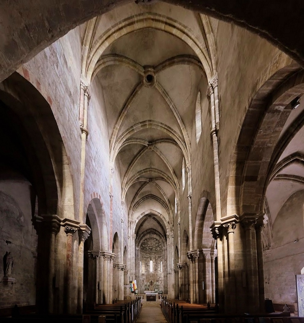 Ják, ehemalige Abteikirche St. Georg, Inneres